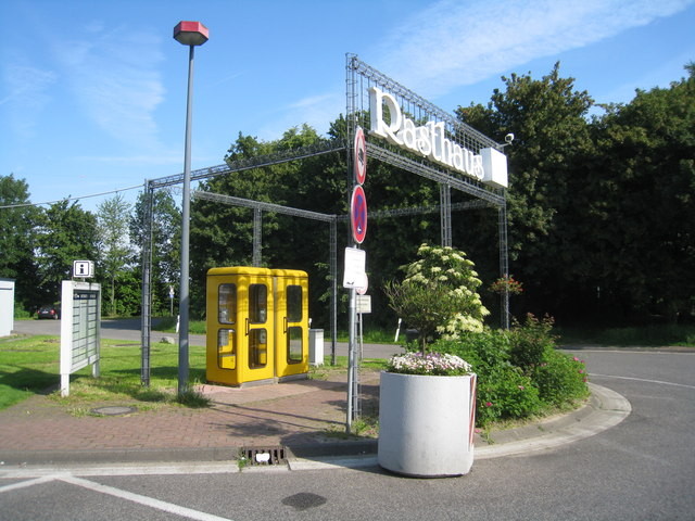 Rastplatz - Aachener Land-Nord (A4)